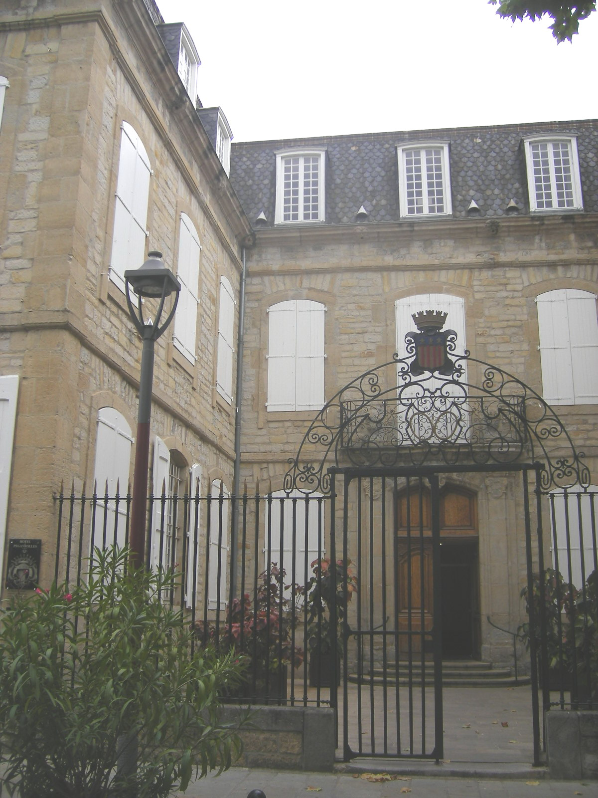 Millau